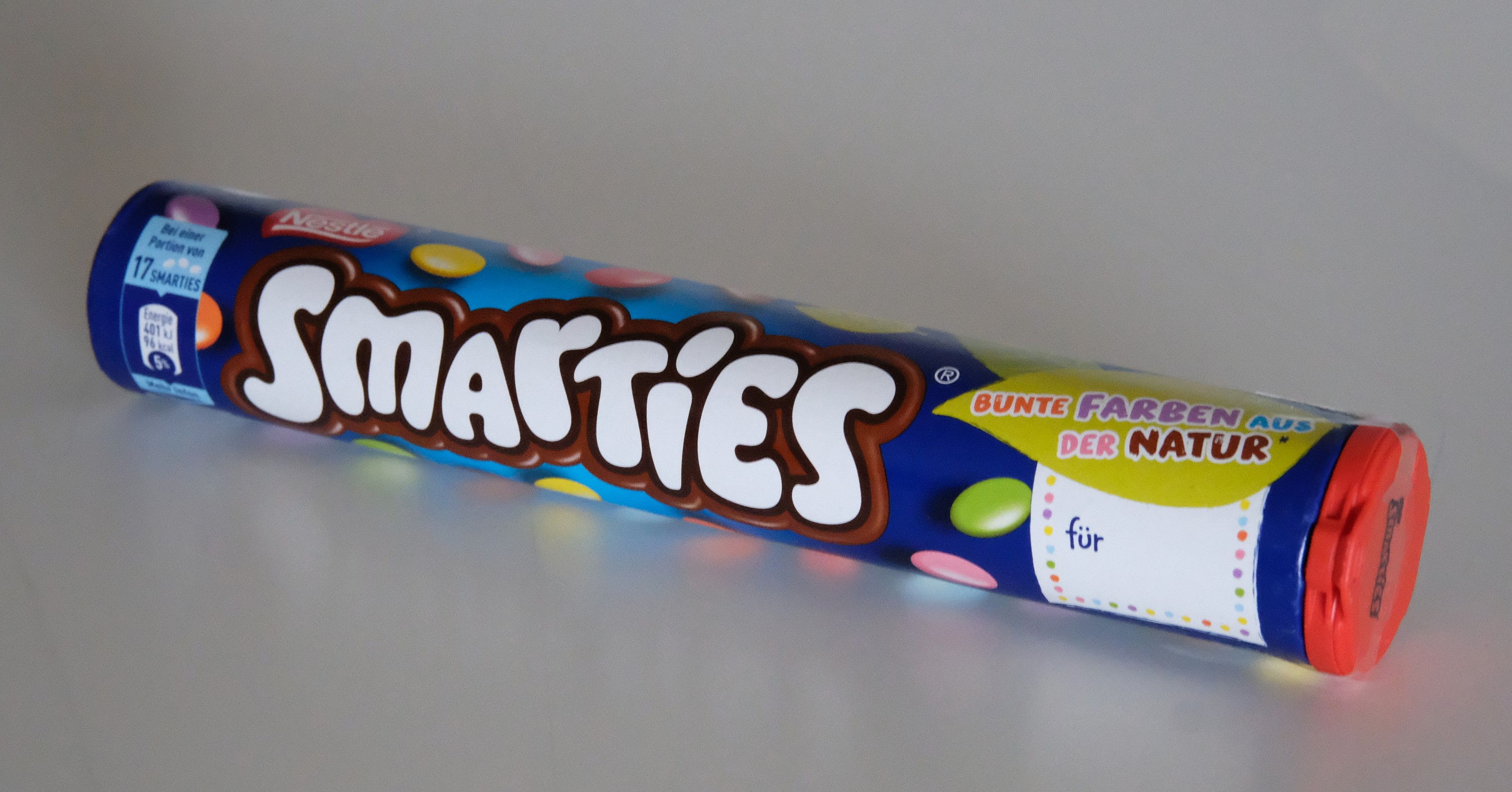 Smarties Riesenrolle